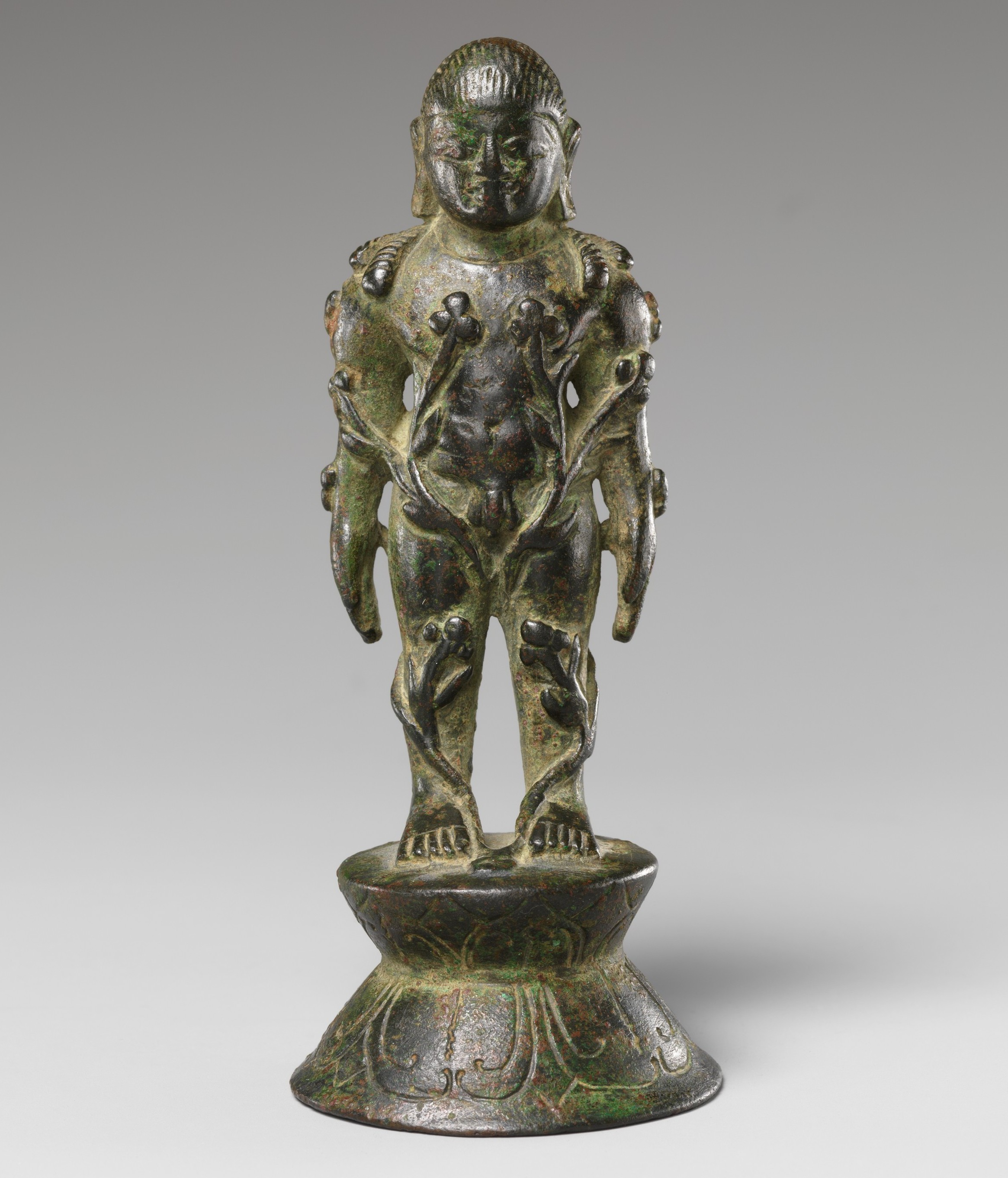 India (Karnataka); Figure; Sculpture (Bahubali)